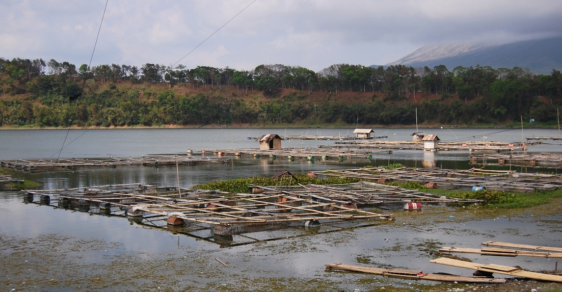 Nile tilapia aquaculture, Ranupakis Lake, Lumajang, East Java, Indonesia